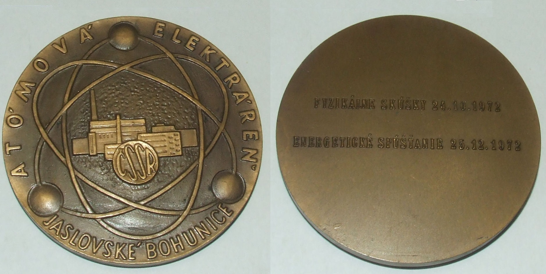 Jaslovské Bohunice elektrárna A1, medaile z roku 1972